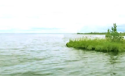 Синдорское озеро. Княжпогостский район, Республика Коми